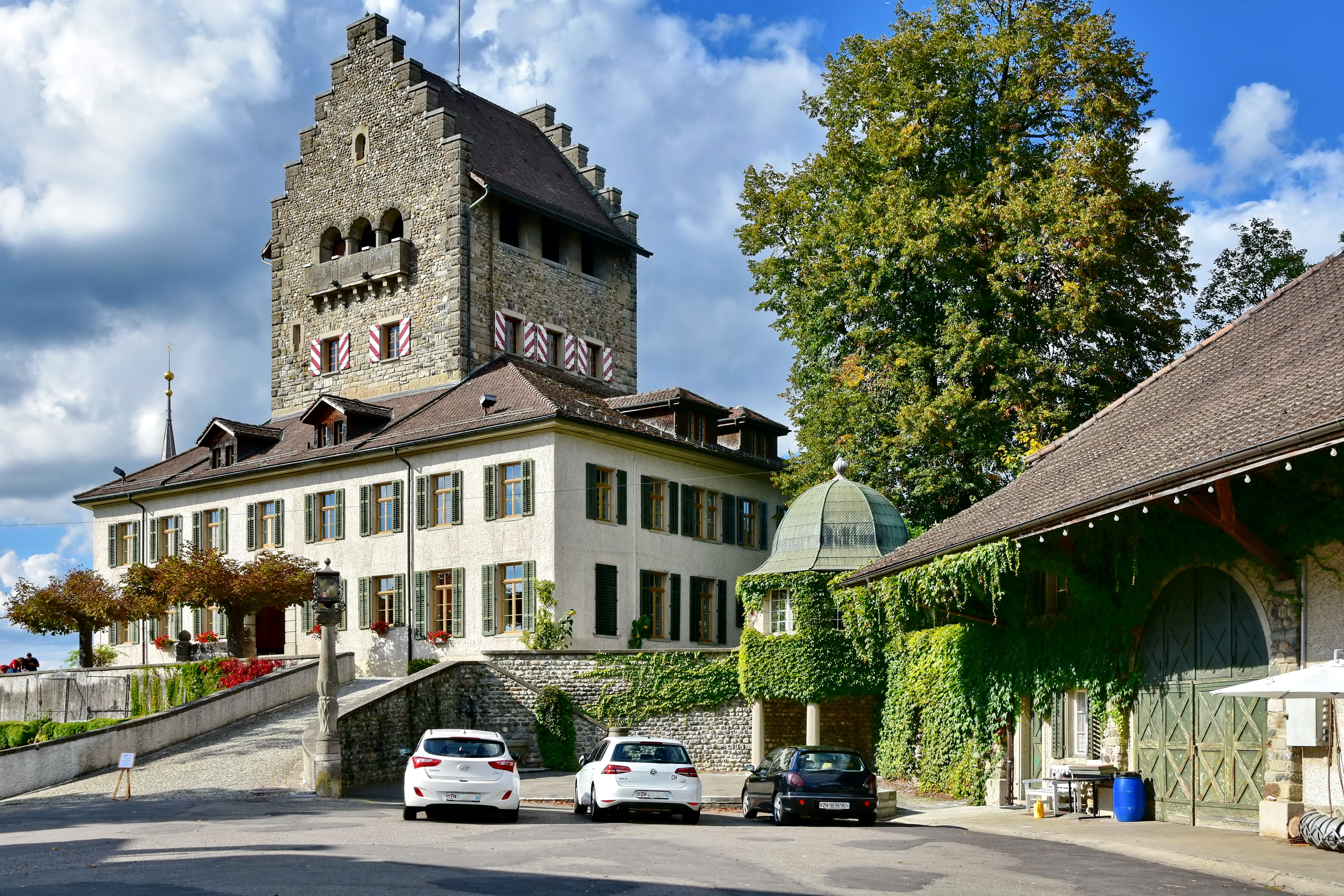 Schloss (Castle) in Uster (Switzerland)